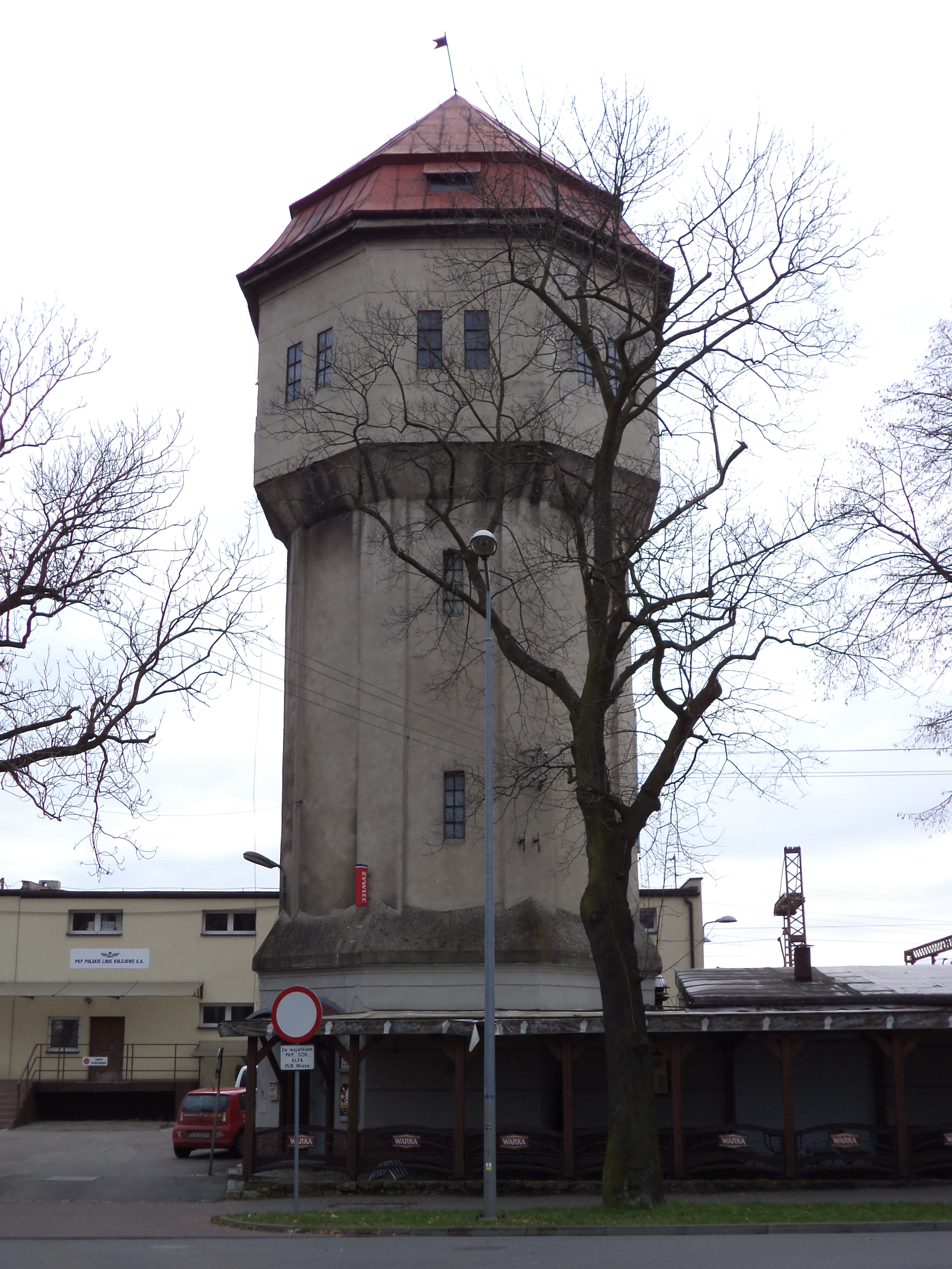 Wieża wodna (ciśnień) przy ul. Częstochowskiej 9 w Tarnowskich Górach